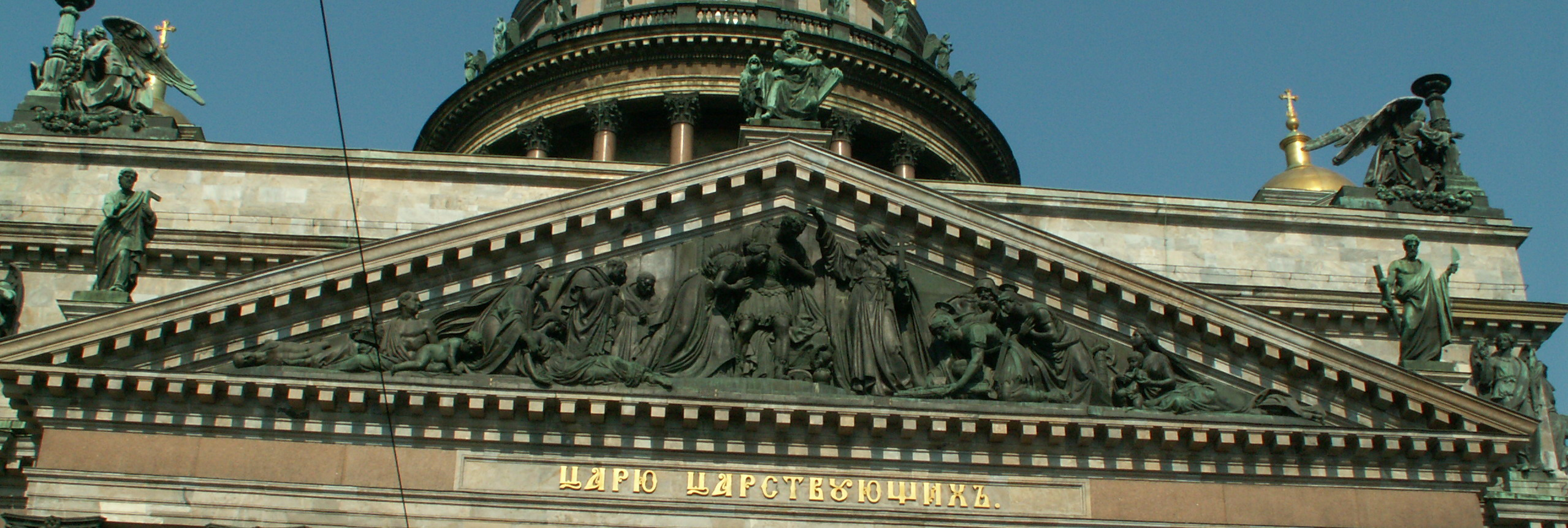 West front of Saint Isaac's cathedral. Saint Petersburg, Russia Западный фронтон Исаакиевского собора. Санкт-Петербург. Россия.